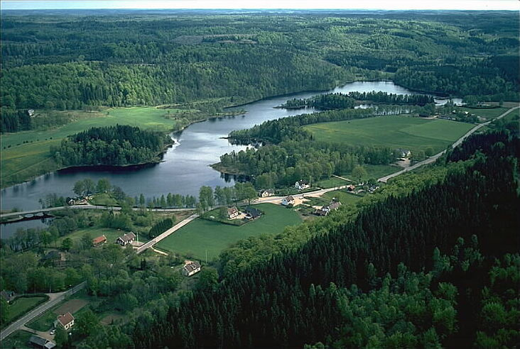 Naturreservatet Sundsholm till vänster i bild. Bilden troligen från mitten av 1970-talet. Motiv: Simlångsdalen Nyckelord: Flygbilder, Naturreservat Kategori: Insjömiljöer, Naturreservat Naturreservatet Sundsholm till vänster i bild. Bilden troligen från mitten av 1970-talet.